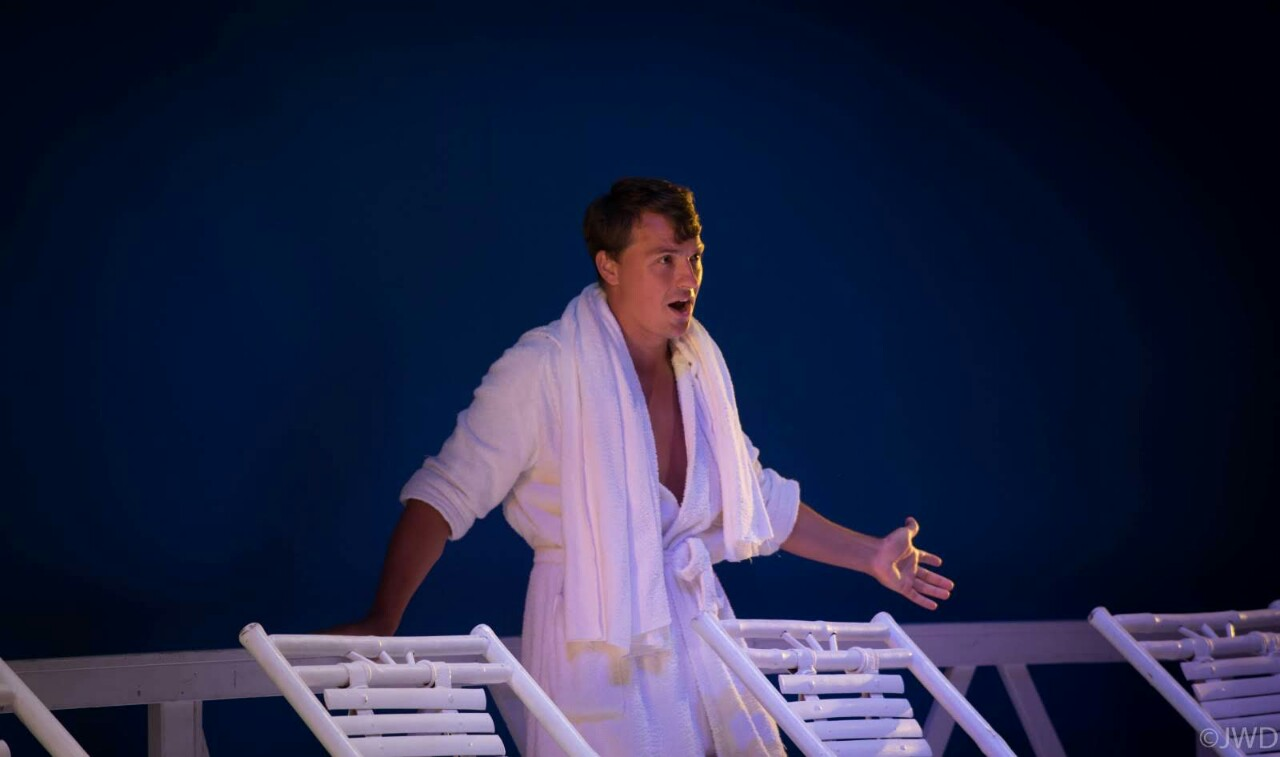 Місто: Пезаро Італія Назва: Подорож до реймсу Дж.Россіні Рік місяць: серпень 2018 Назва фестивалю: Rossini opera festival Місце проведення: Театр Россіні